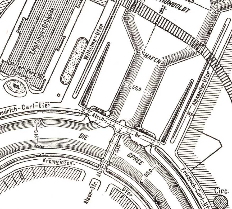 Berlin - Humboldthafen und Neuer Packhof, Lageplan 1896 kartenausschnitt um den Humboldthafen und die Alsenbrücke